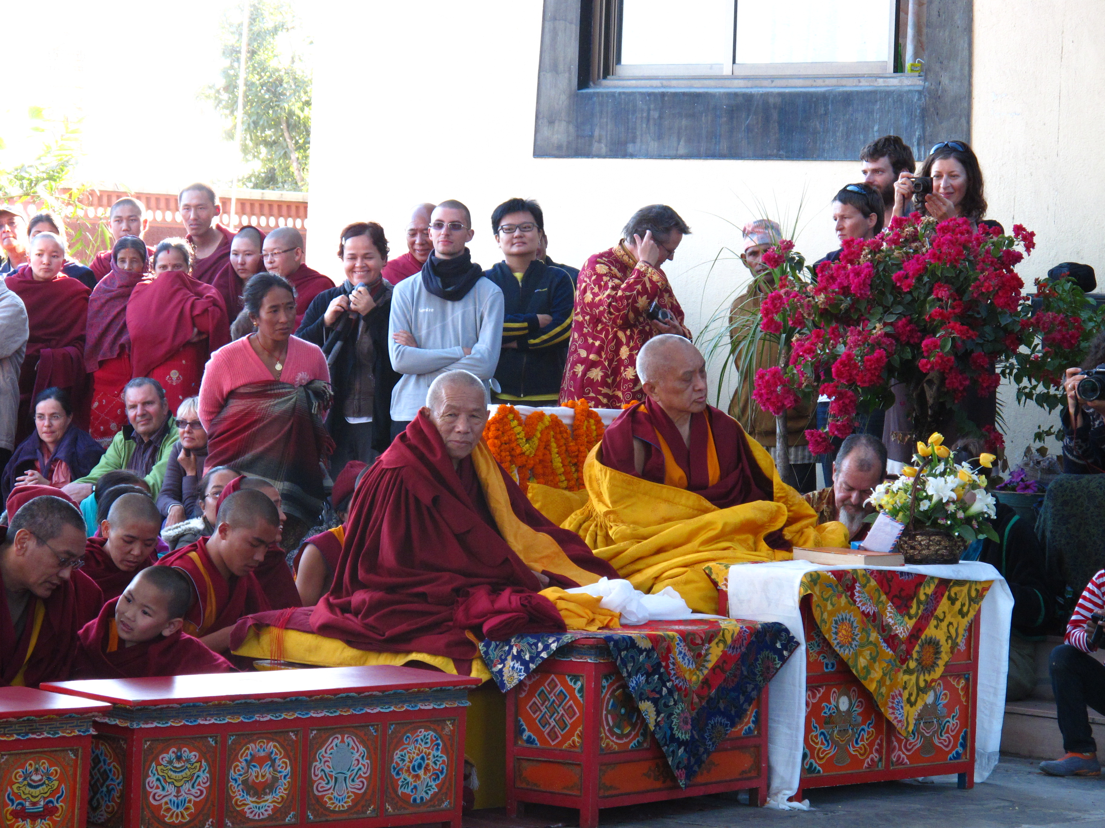 Le kid reincarne a gauche, Lama Lhundrup au milieu, et Lama Zopa Rinpoche a droite.